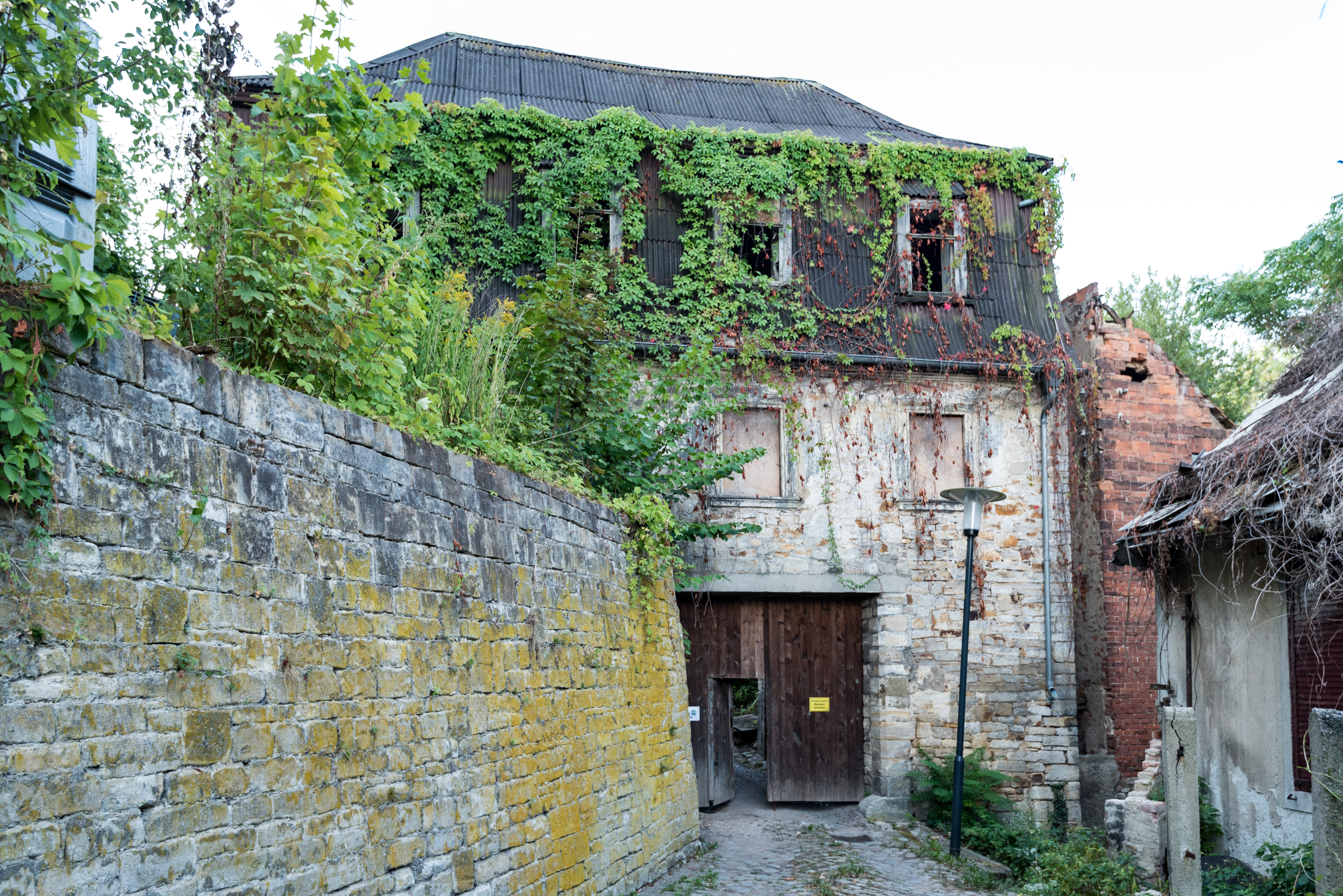 Weißenfels, Pfeffergasse 3